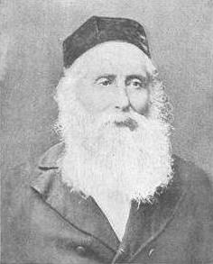 Chaim Zelig Słonimski